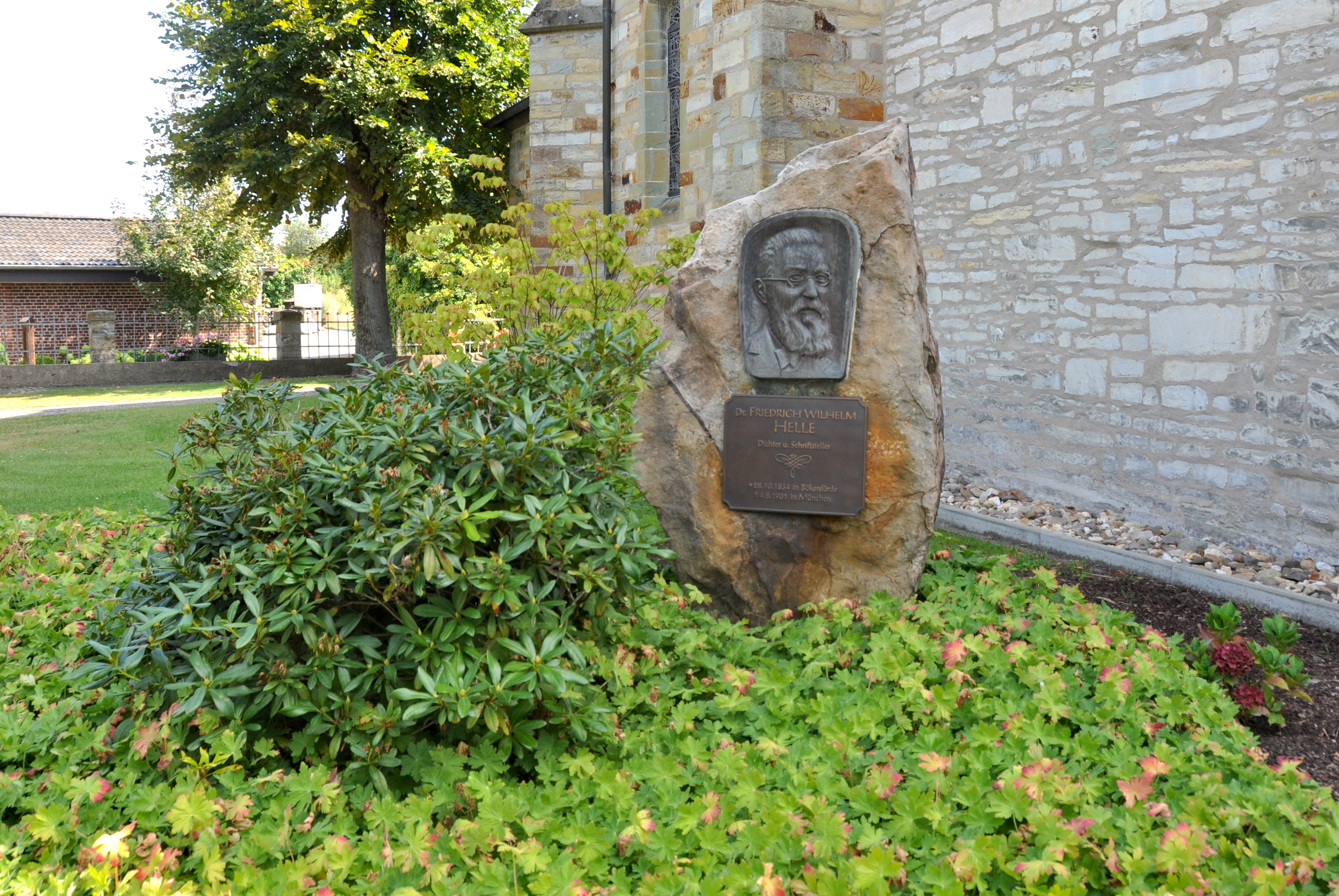 Denkmal Friedrich Wilhelm Helle an der Katholischen Pfarrkirche St. Dionysius in BökenfördeThis is a photograph of an architectural monument., no. 147